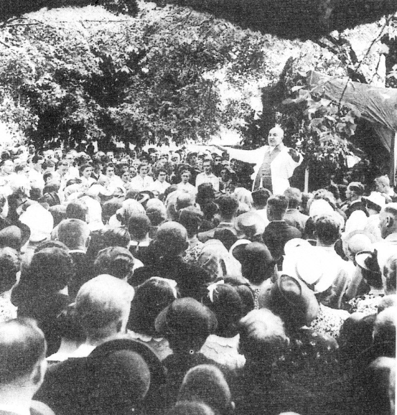 Národní pouť na Budči v létě roku 1939, která přerostla v manifestaci proti německé okupaci českých zemí; na pouti poslední červnový den kázal páter Alois Tylínek.